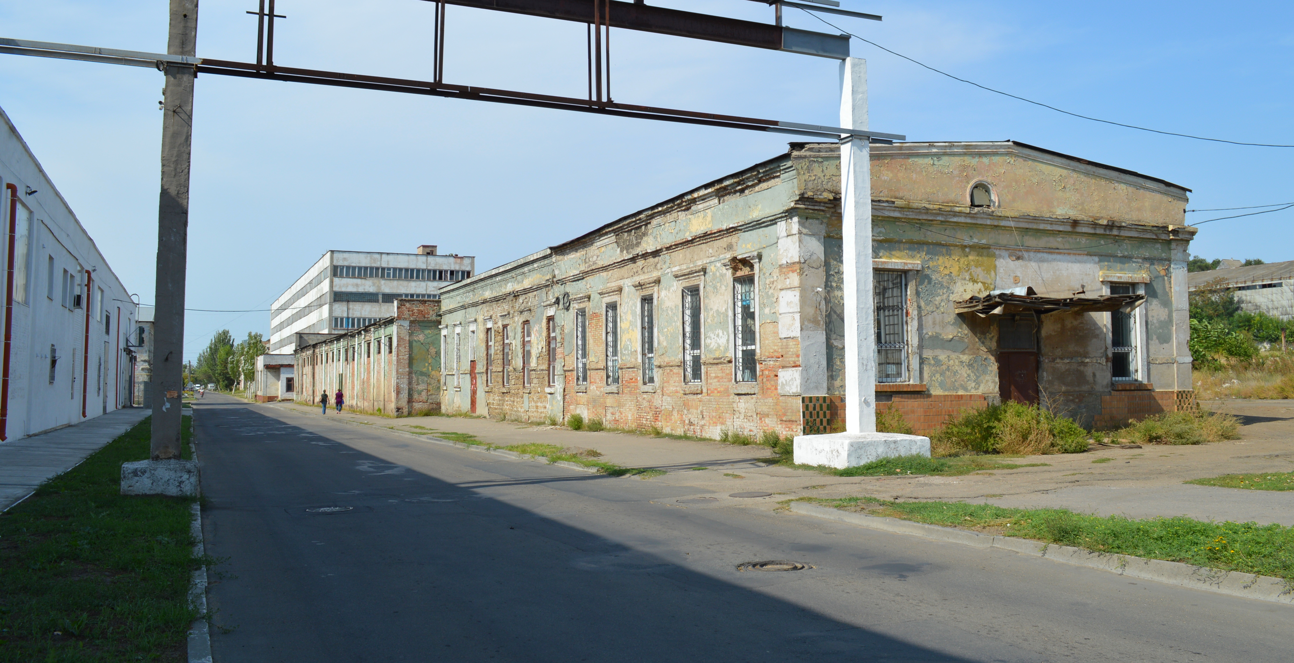 Комунарів вулиця, Бердянськ, вул. Консульська (Комунарів)